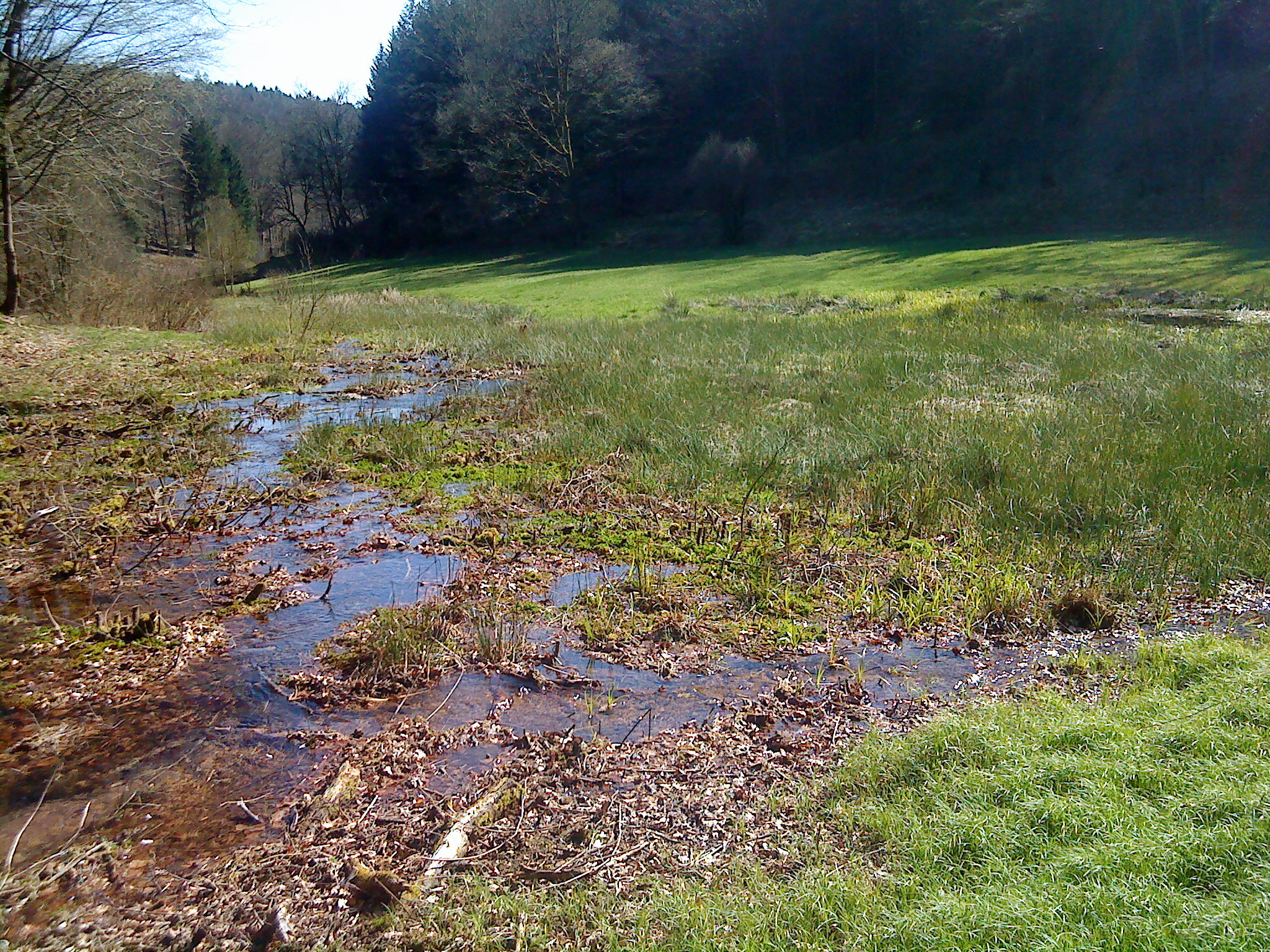 Verzweigter Bächlesbach in den Spessartwiesen